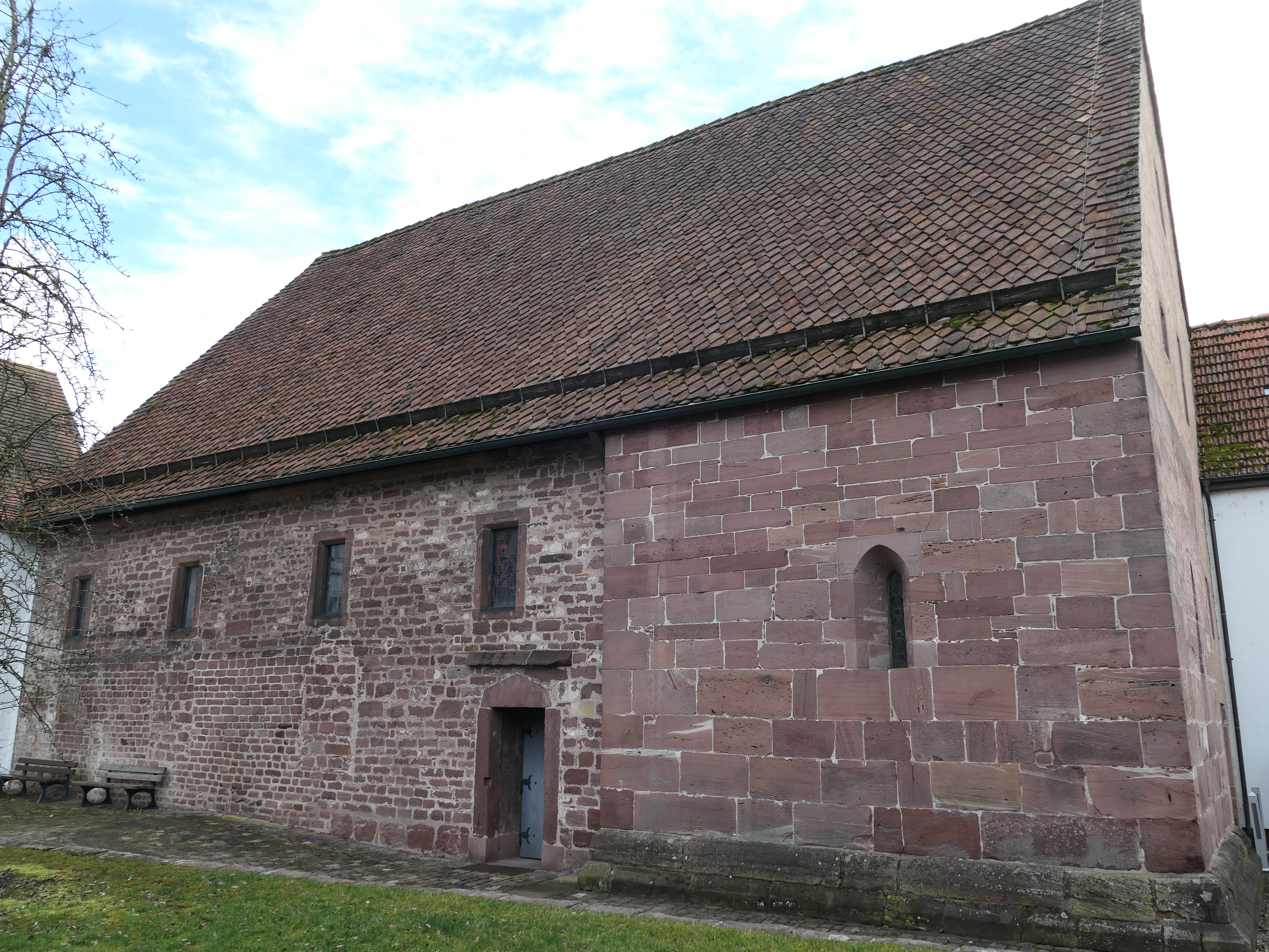 Aurelius Hirsau Nordansicht Turmstumpf Nordwest Langhaus